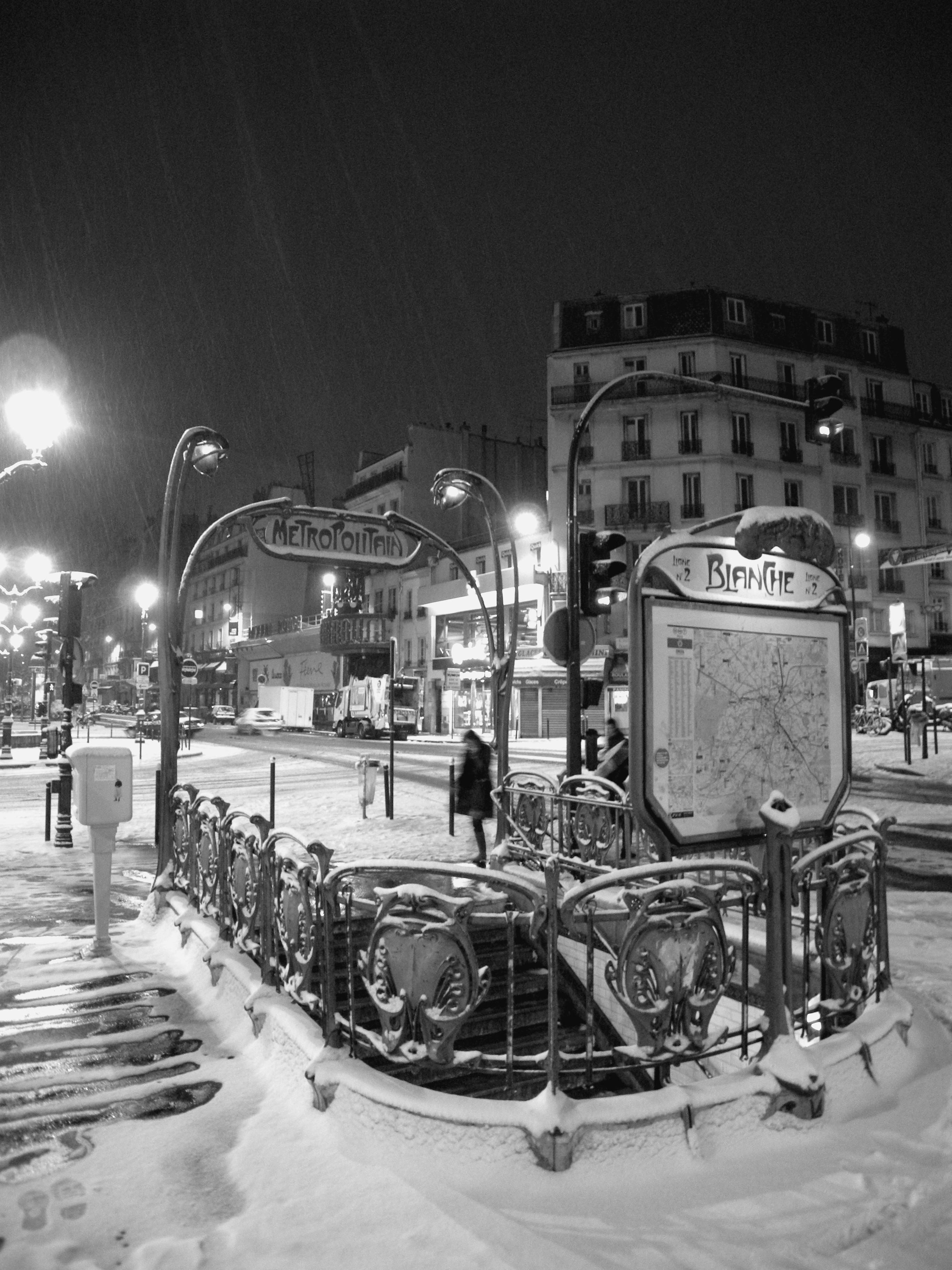 Station de métro Blanche, Paris XVIIIe, France